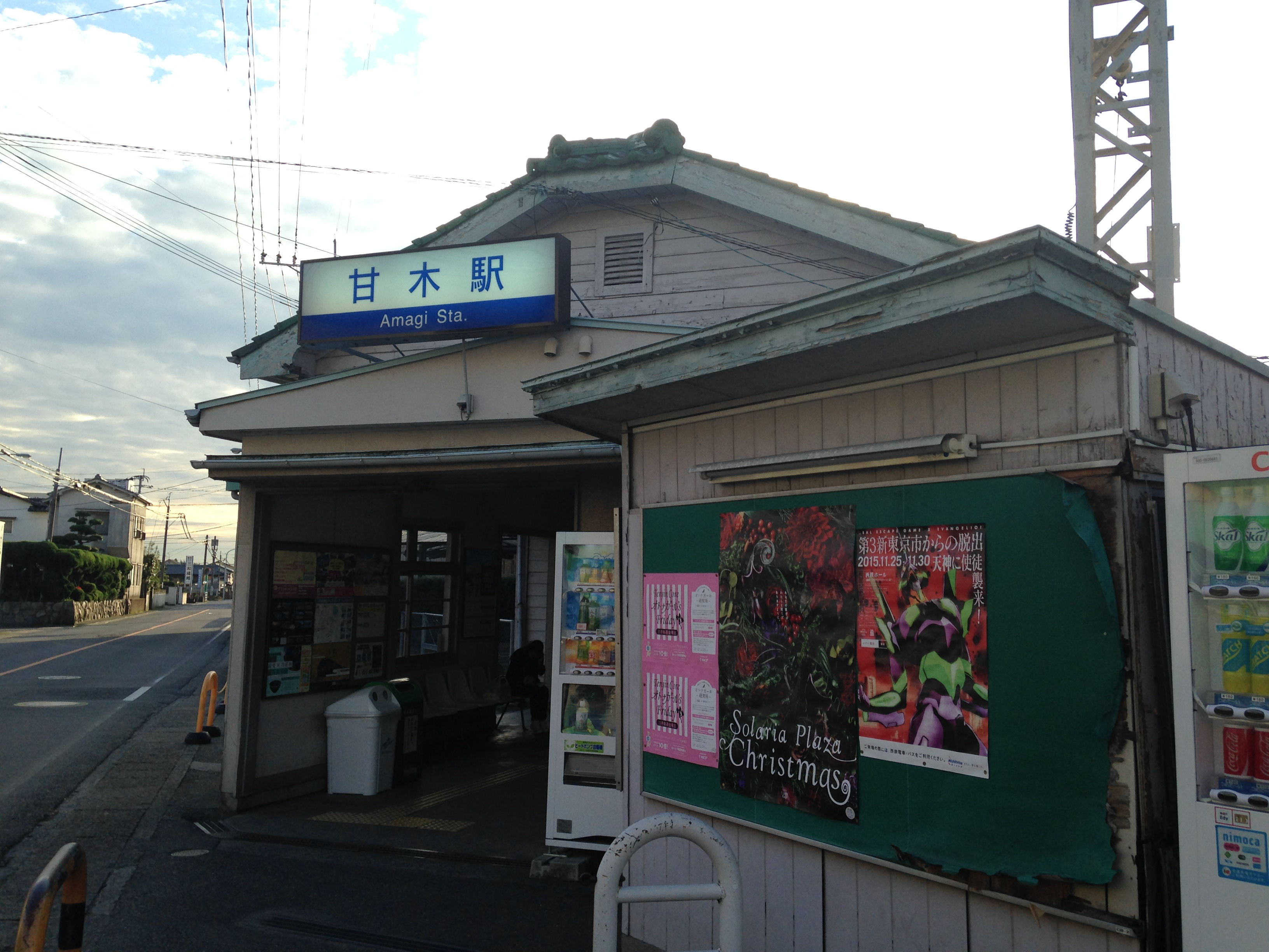 甘木駅(西鉄)の駅舎